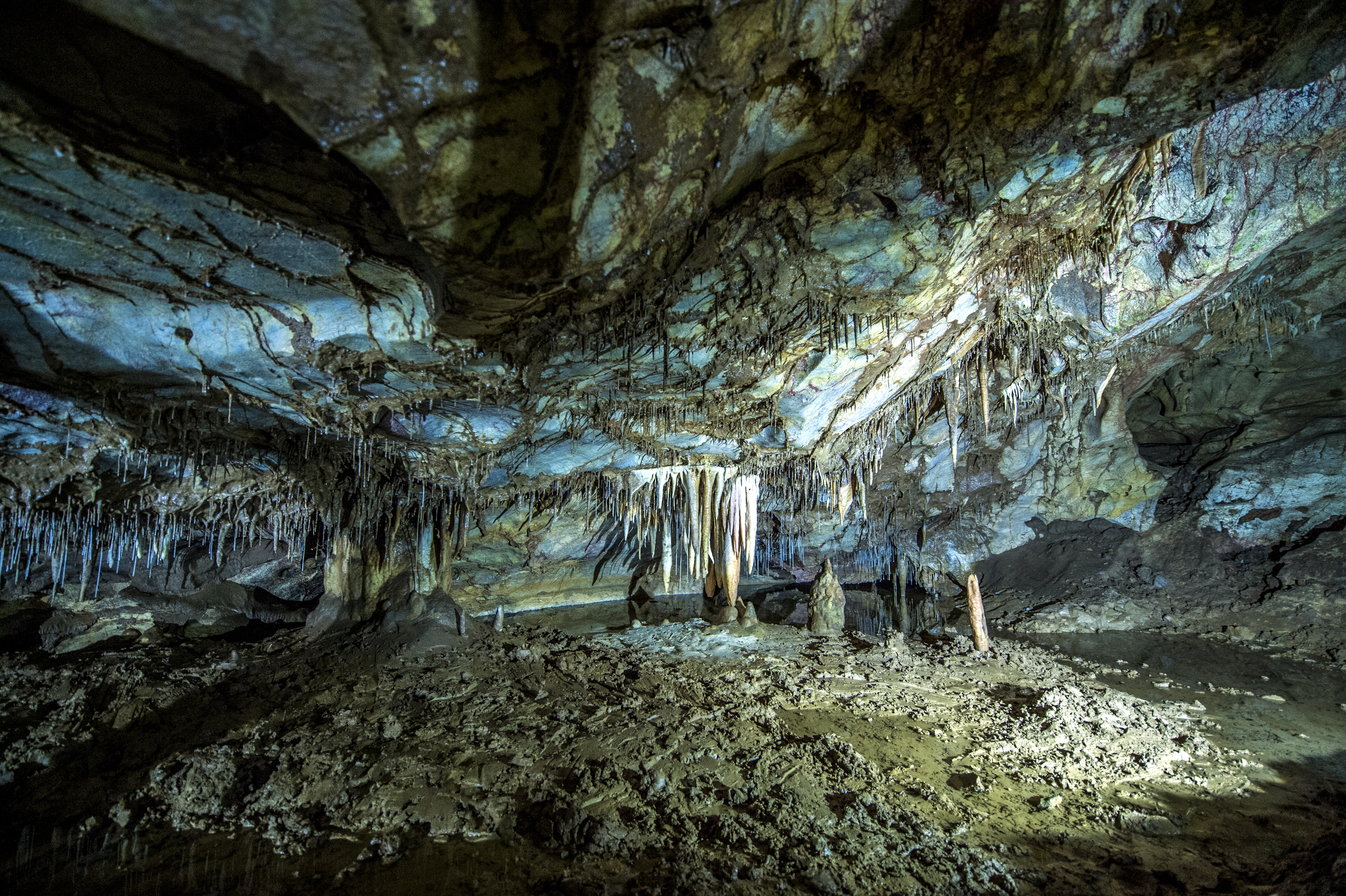 Shpella e Gadimes, Lypjan